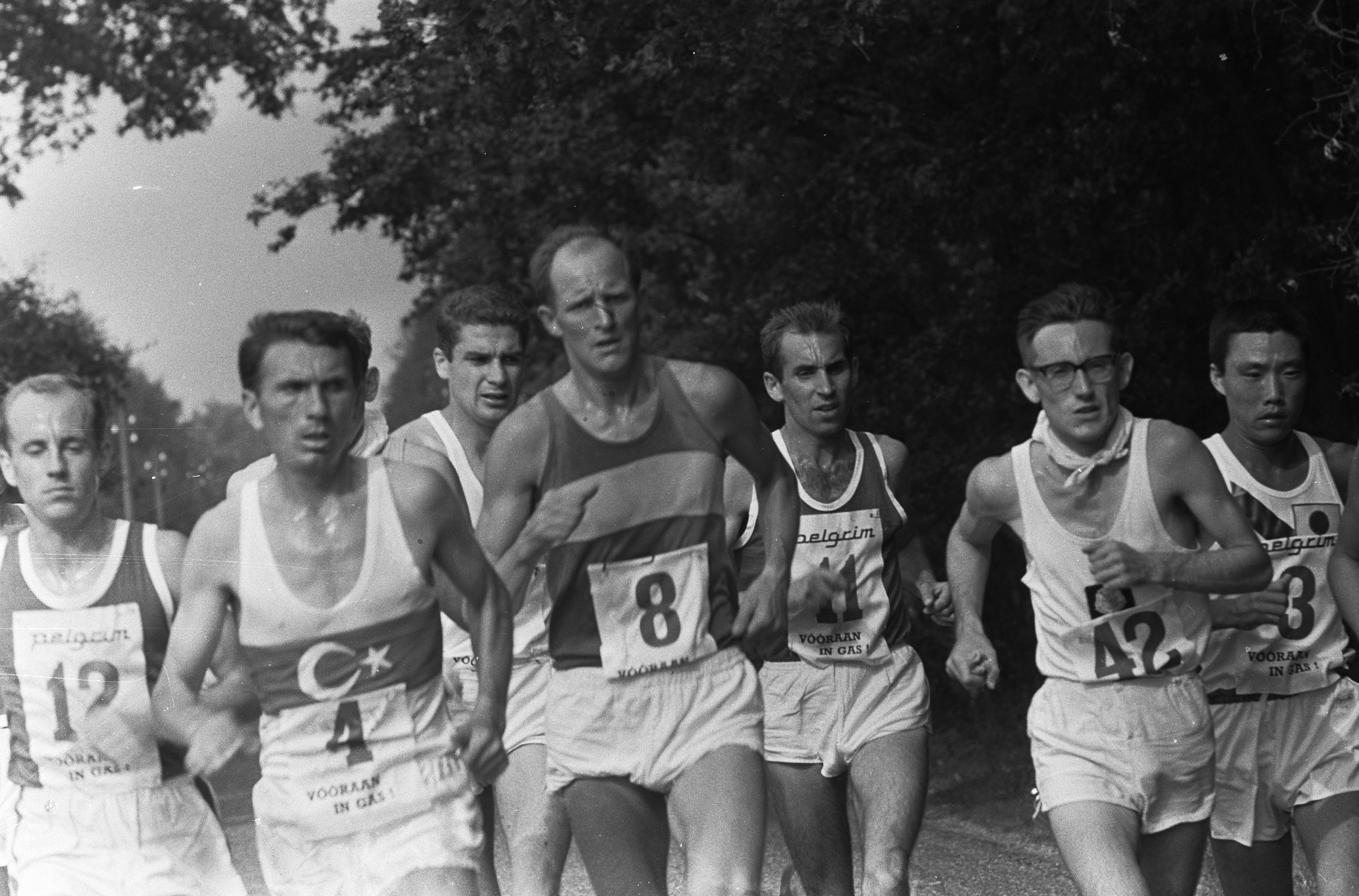 Collectie / Archief : Fotocollectie Anefo Reportage / Serie : [ onbekend ] Beschrijving : Elfde Internationale Marathon Enschede. De kopgroep Akcay (4), Steylen (8), Riesner (5), Newsome (42), Mifune (winnaar) en dr. Ron Hill / Datum : 26 augustus 1967 Locatie : Enschede Trefwoorden : MARATHONS, Winnaars, kopgroepen Fotograaf : Merk, Ben / Anefo Auteursrechthebbende : Nationaal Archief Materiaalsoort : Negatief (zwart/wit) Nummer archiefinventaris : bekijk toegang 2.24.01.05 Bestanddeelnummer : 920-6390